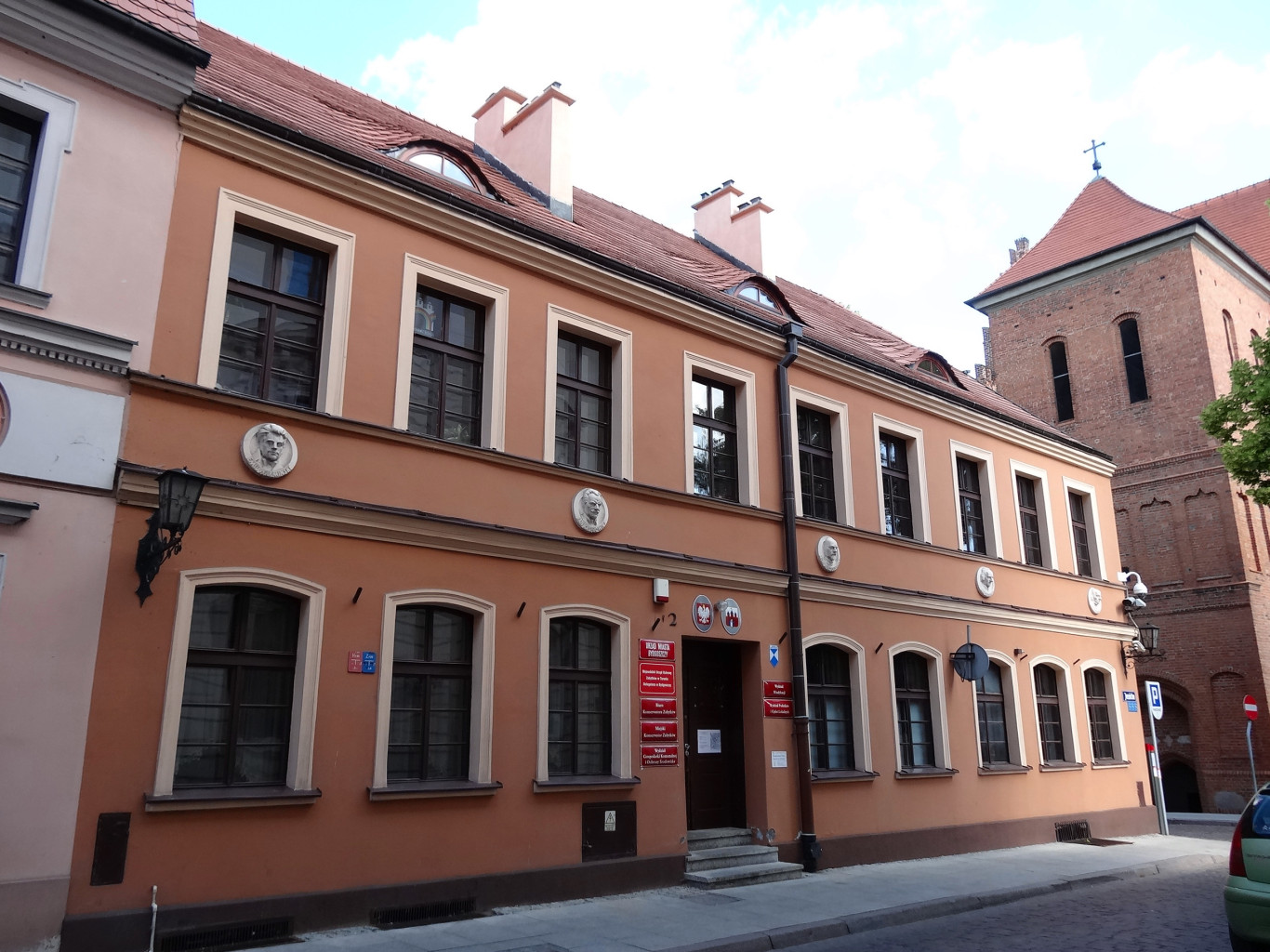 Kamienica przy ul. Jezuickiej 2 w Bydgoszczy